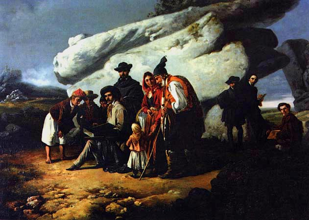 Primeiro retrato colectivo de artistas feito em Portugal.